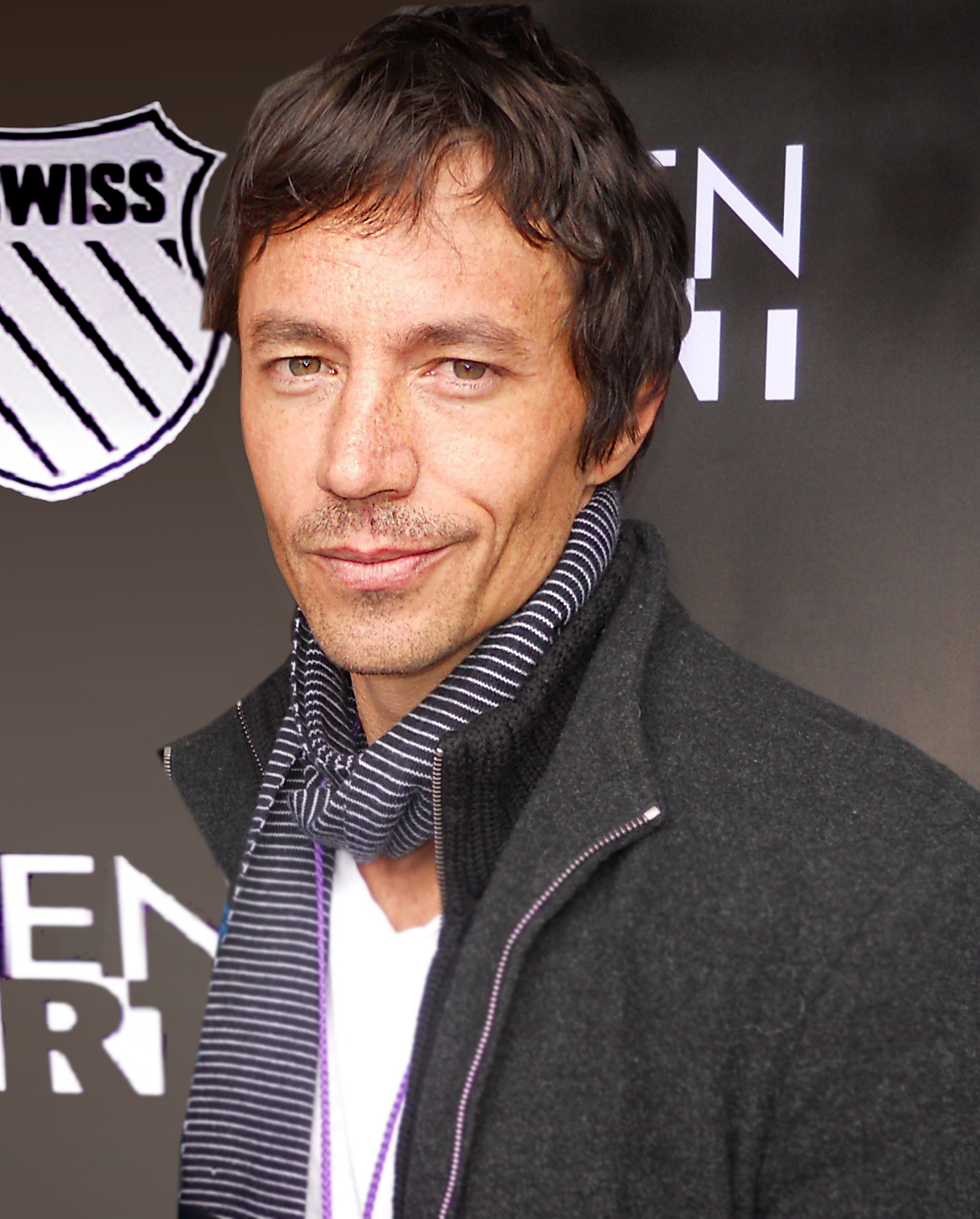 Michael Piccirilli, Obselidia, Sundance 2010, RealTVfilms